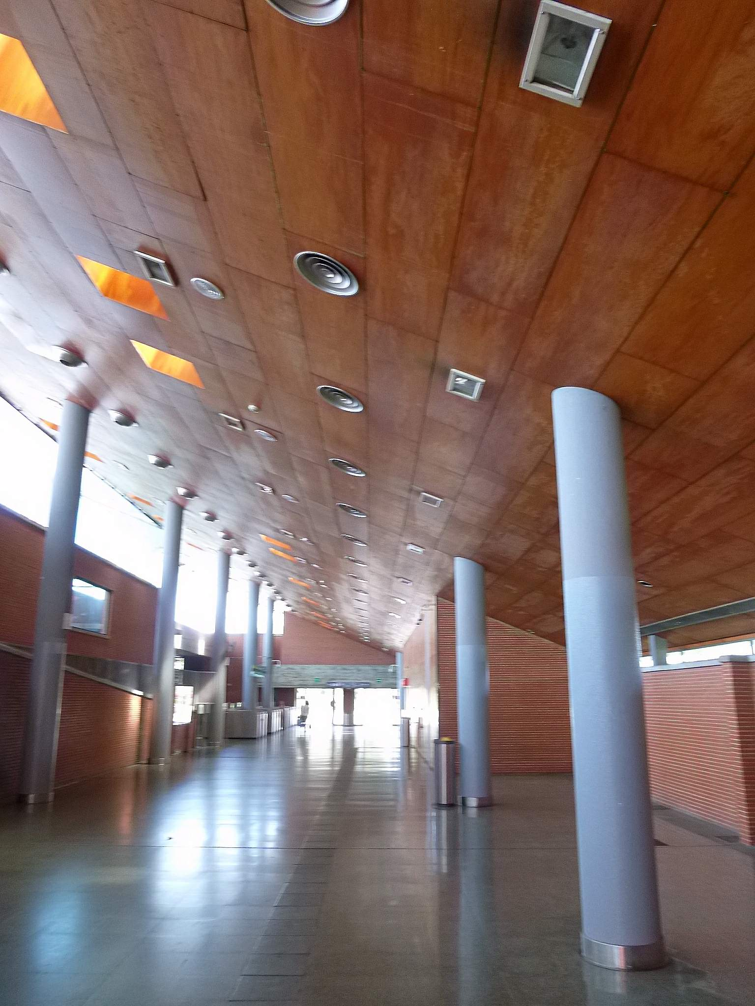 Madrid - Distrito de Puente de Vallecas - Estación de El Pozo